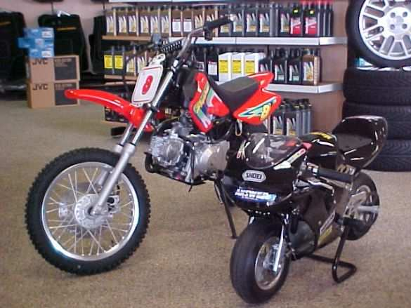 minibike in etalage